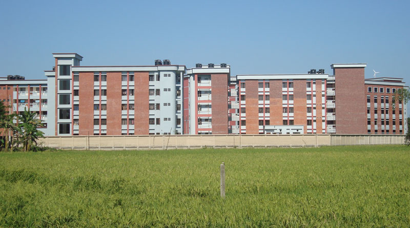 ময়মনসিংহ ইঞ্জিনিয়ারিং কলেজ